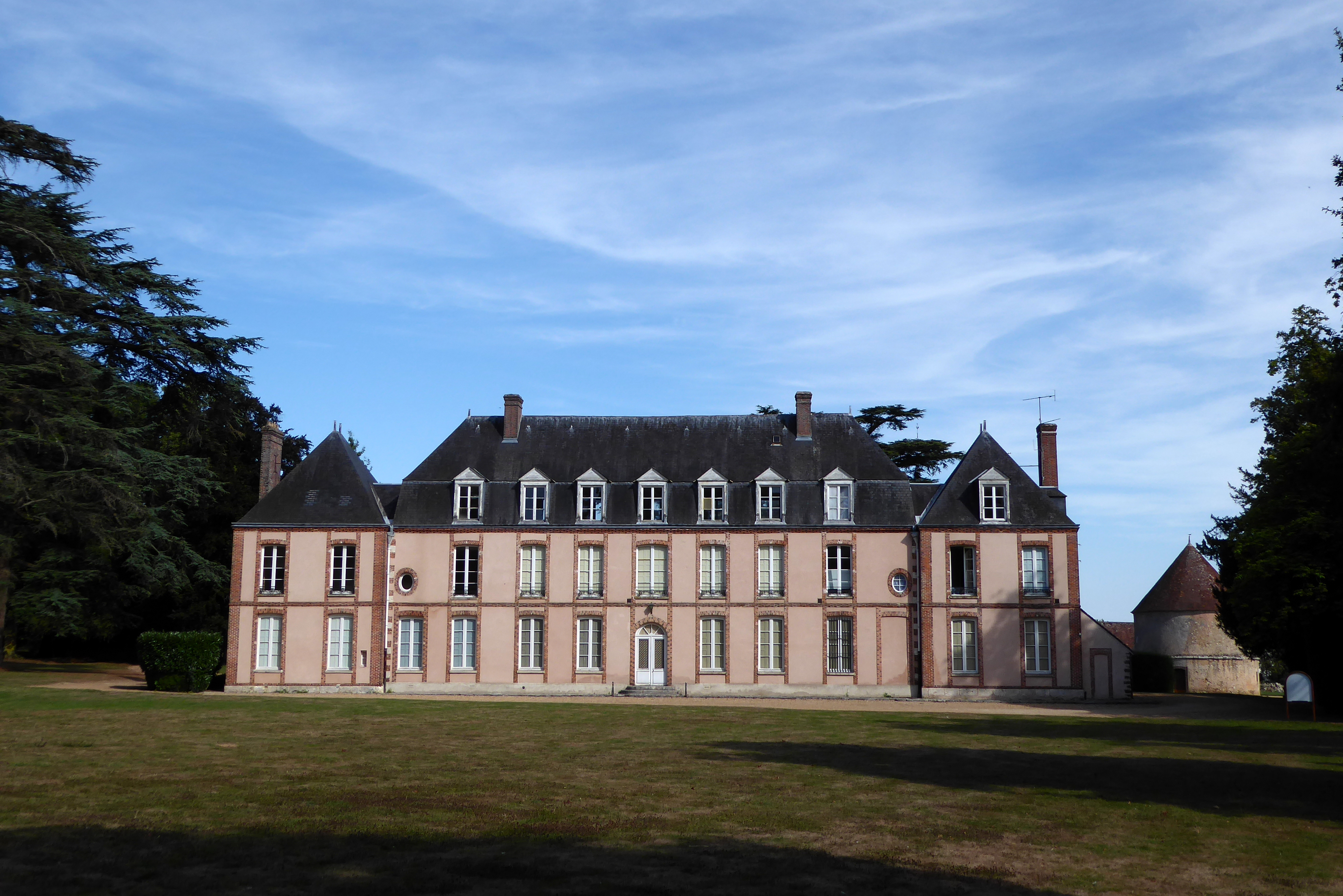 Mairie-château de Fontaine-la-Guyon, Eure-et-Loir (France).